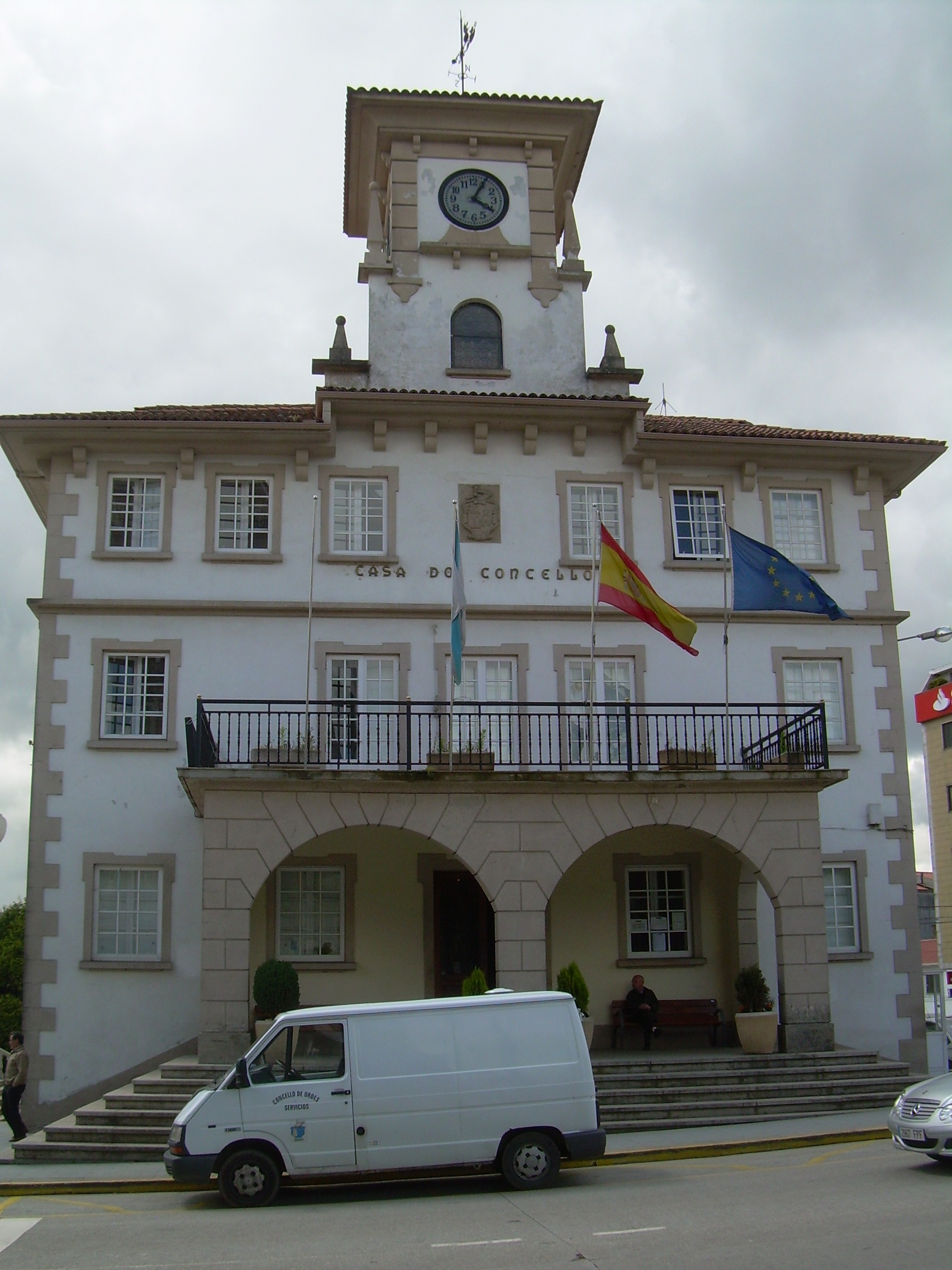 Wikipedia:LicenzaMapaSobreira Ordes Categoría:Imaxes de Ordes